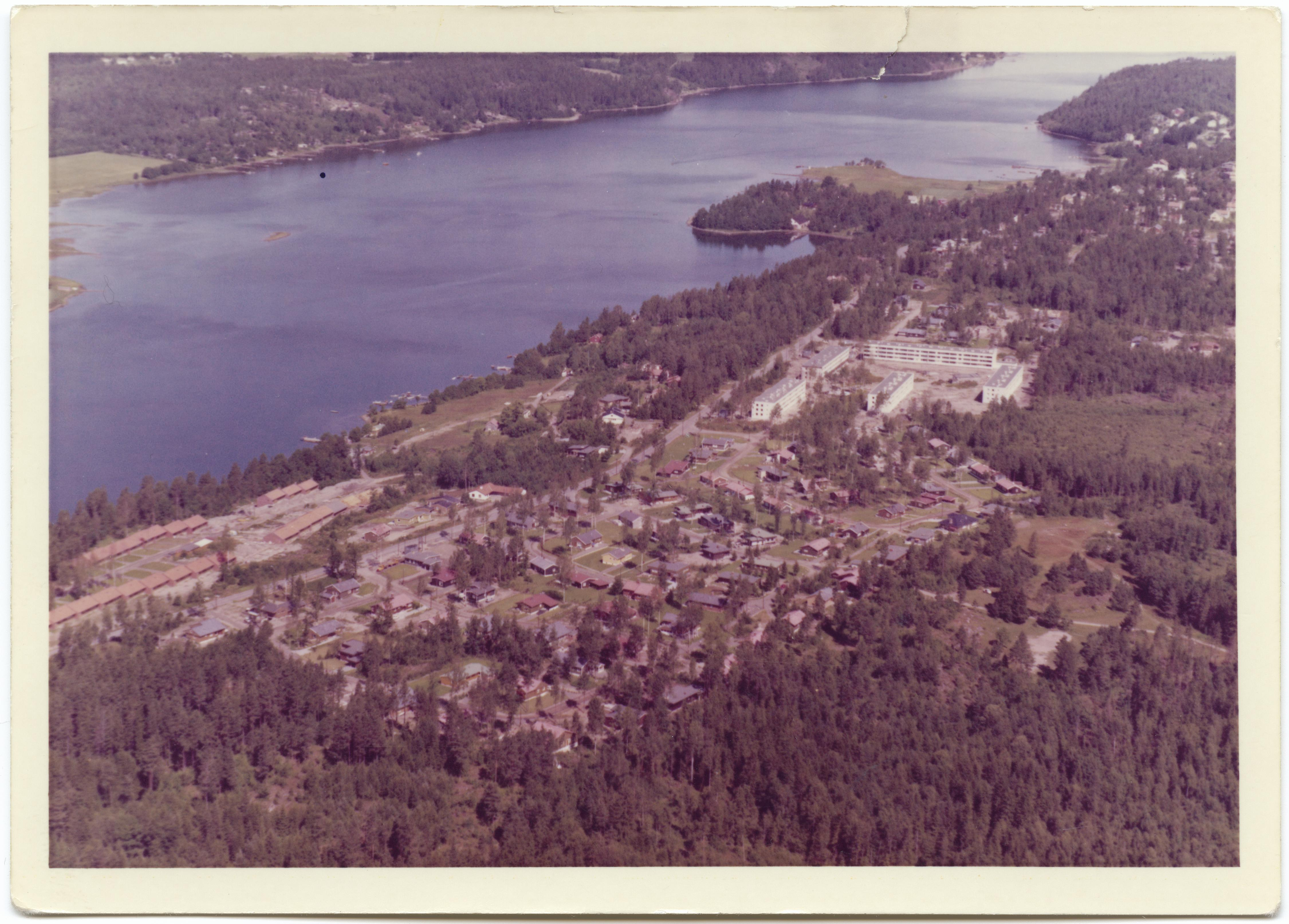 WF.S.185253 Stokke i bakgrunnen